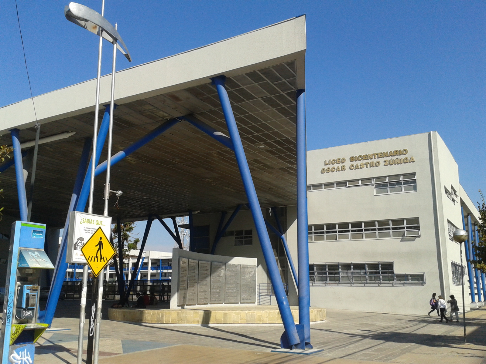 Liceo Óscar Castro, Rancagua.